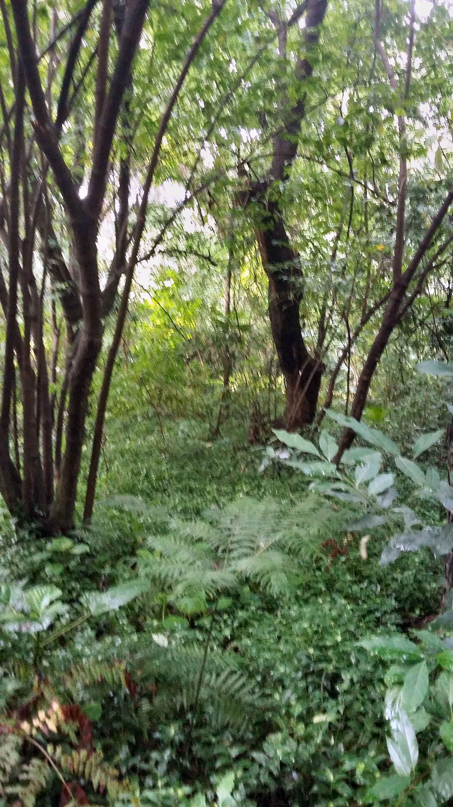 Detalle del parque Percy Hill